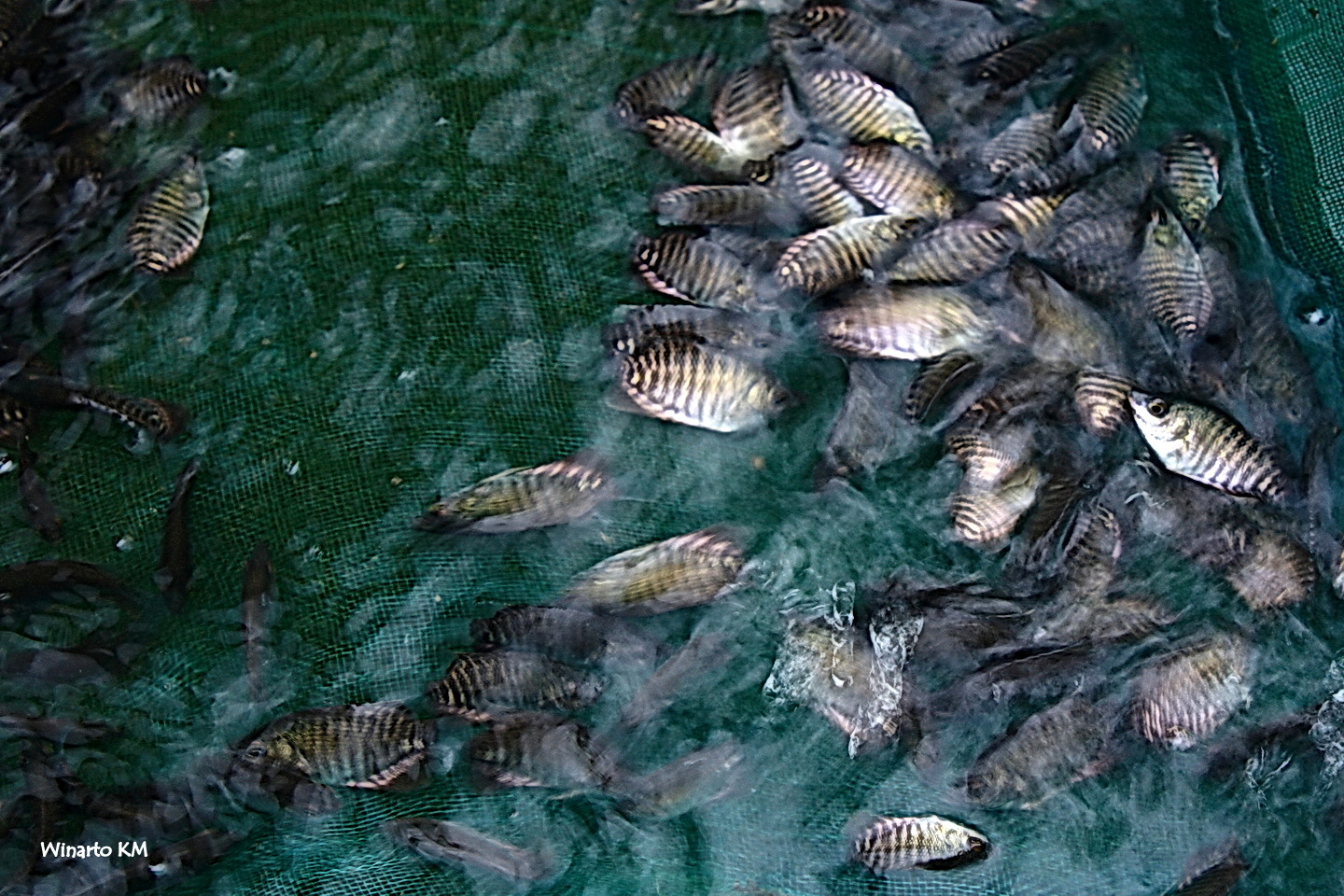 Benih Gurami usia 50-60 hari